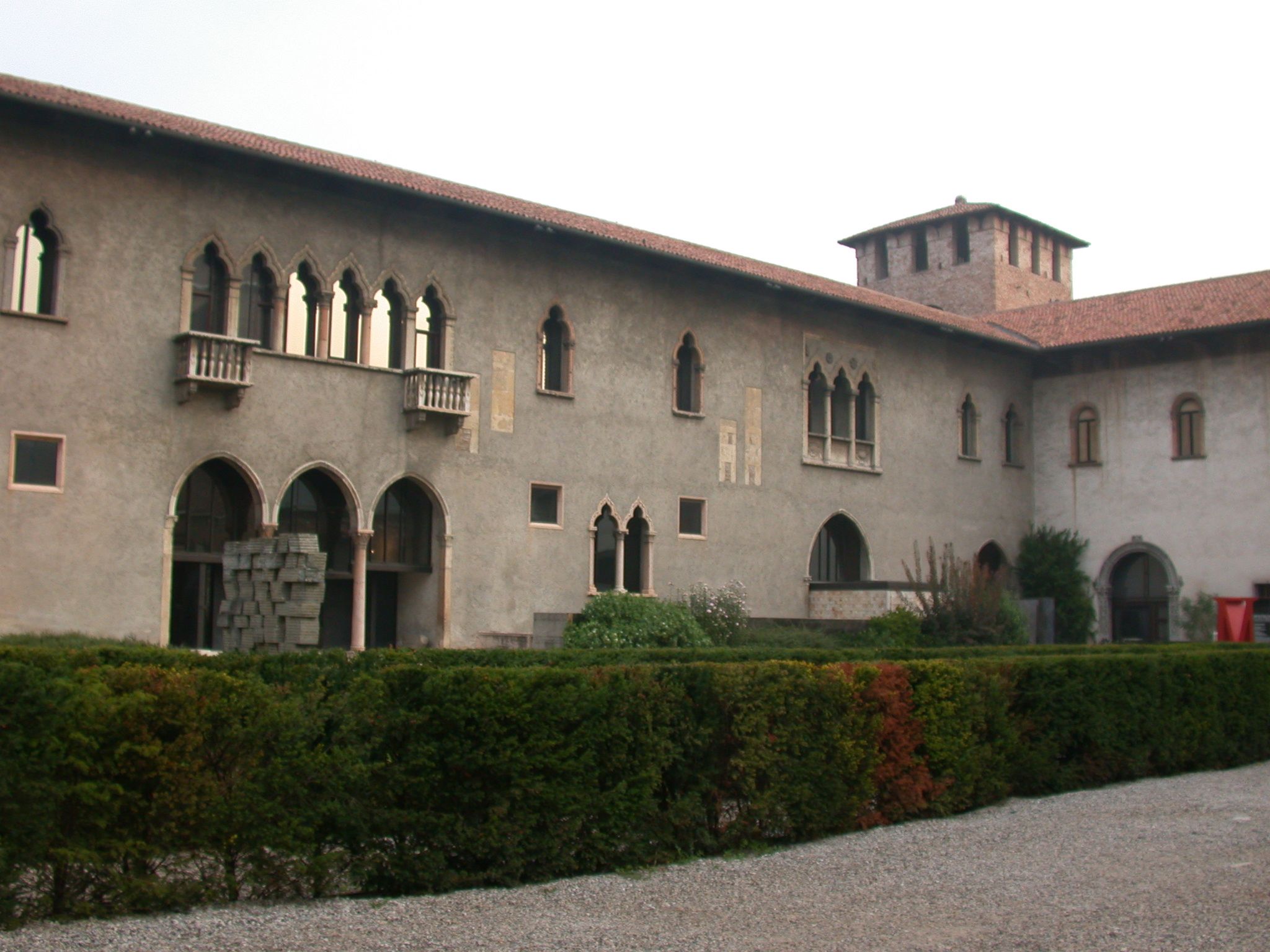 Verona, "Castelvecchio" (interior court)